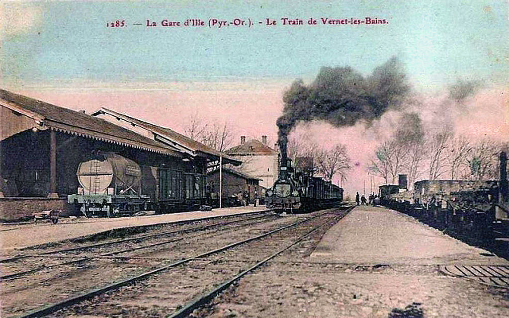 Wagon citerne en gare d'Ille sur Tet